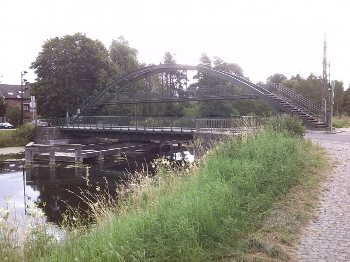 Le pont tournant à l'entrée d'Arquennes, rénové en 2015